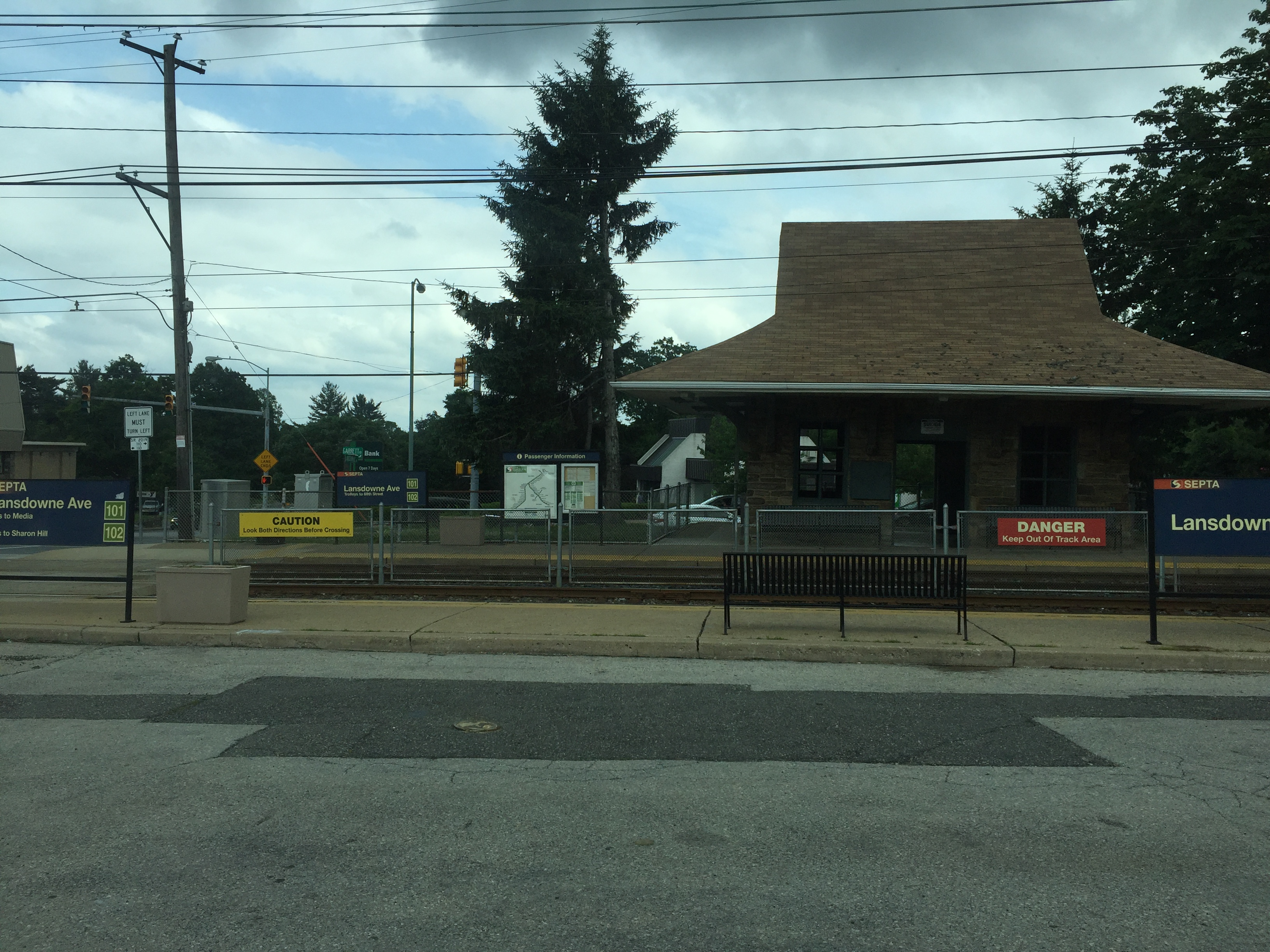 Lansdowne avenue station